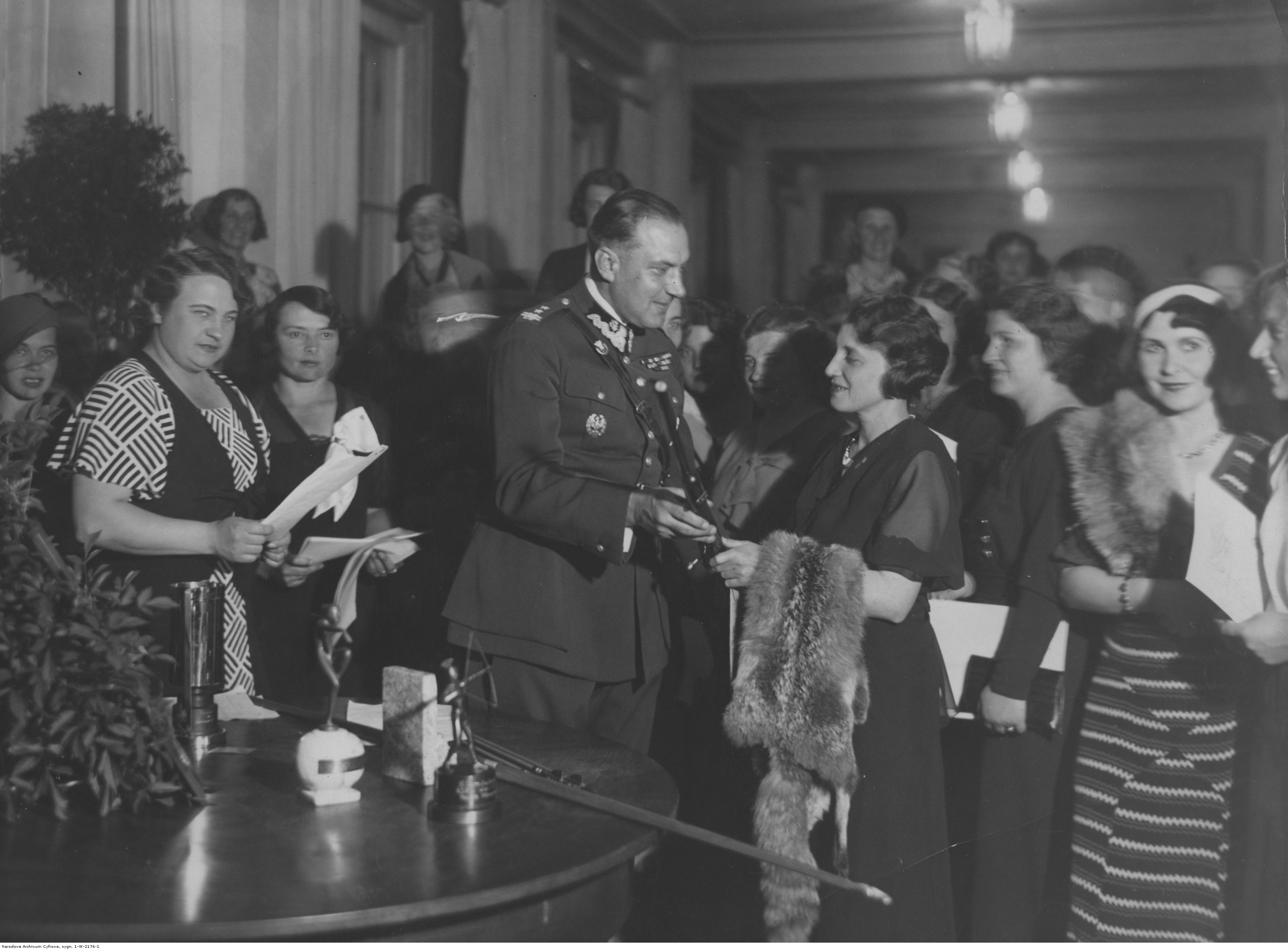 Zawody konne Rodziny Wojskowej w Warszawie. Podpułkownik WP Włodzimierz Ludwig wręcza p. Kolendowskiej z Baranowicz nagrodę wiceministra Składkowskiego za najlepszy wynik w strzelaniu. Obok p. majorowa H. Jurgielewiczowa (2 z lewej) i p. majorowa Lipińska (3 z lewej). Koncern Ilustrowany Kurier Codzienny - Archiwum Ilustracji. Sygnatura: 1-W-2176-1